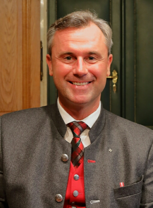 Norbert Hofer, 3. Parlamentspräsident und interimistischer Bundespräsident, im österreichischen Parlament anlässlich des Tags der offenen Tür am Nationalfeiertag 2016.